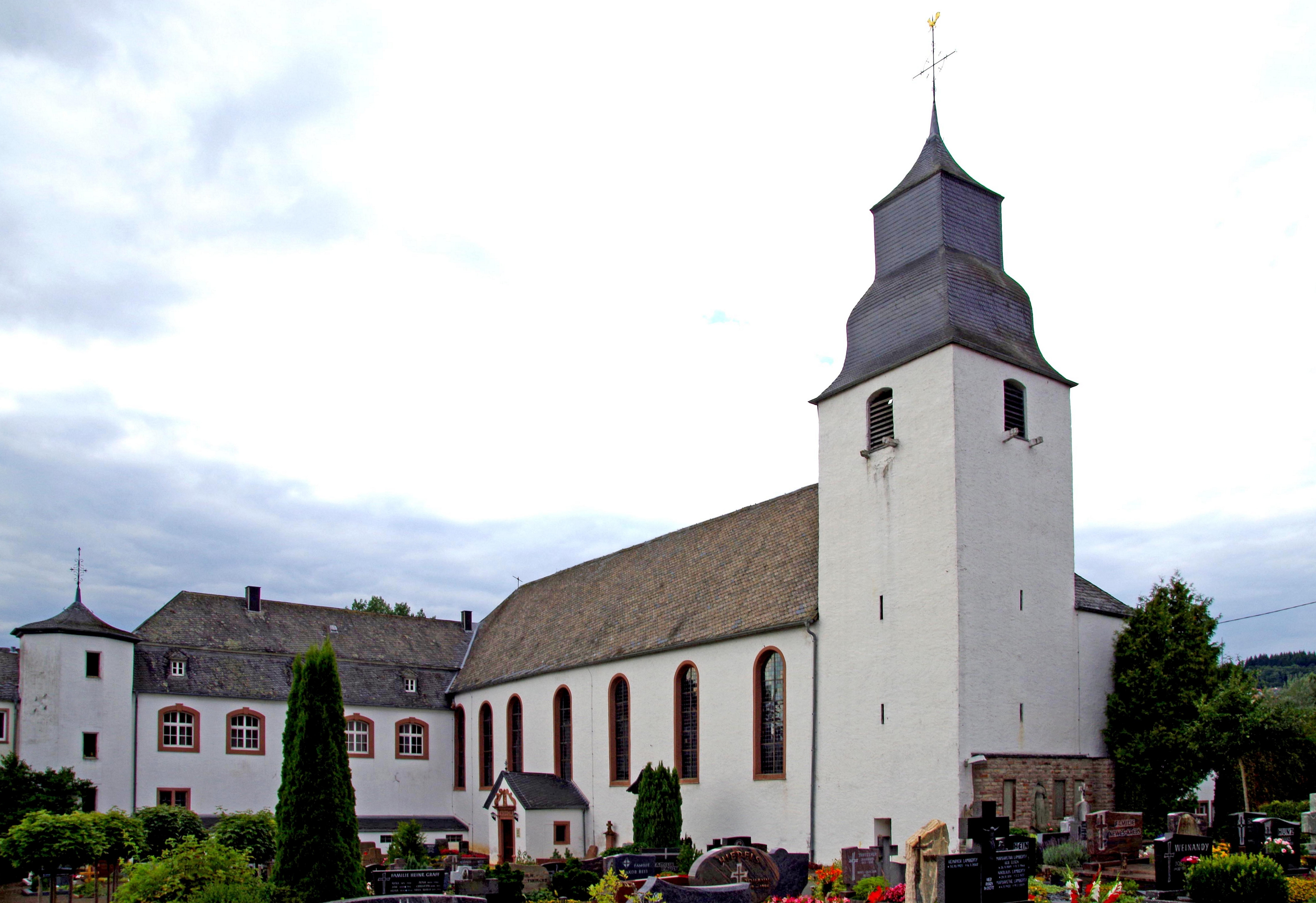 St. Gordian und Epimachus (Niederprüm), Südostansicht